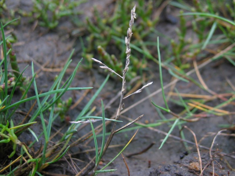 Strand-Salzschwaden Puccinellia maritima, Wismarbucht